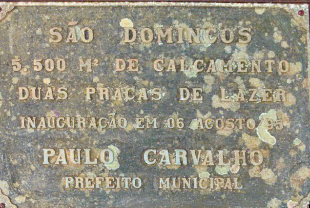 Placa em praça da comunidade de São Domingos, em Muriaé